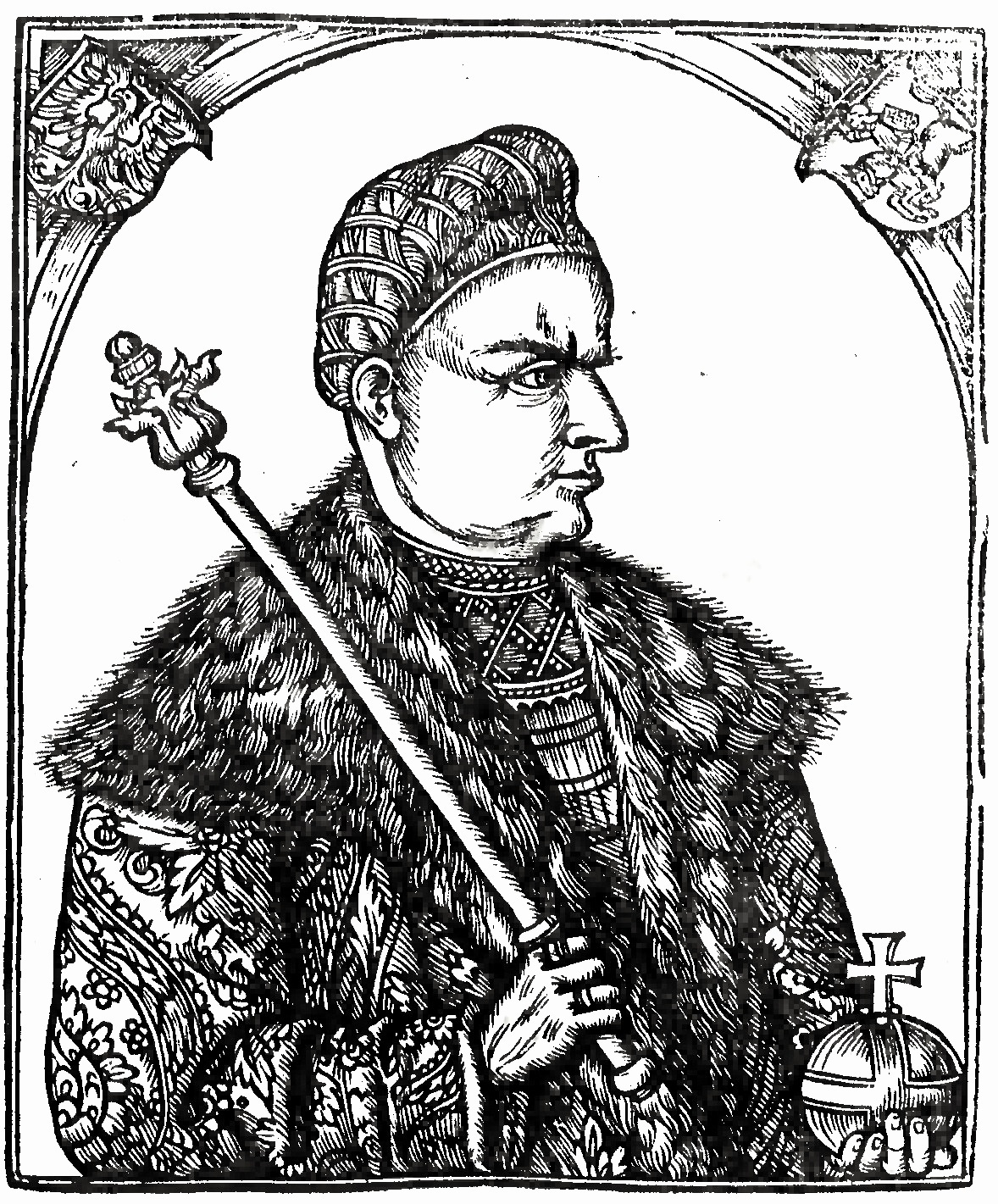 Portret Zygmunta I Starego